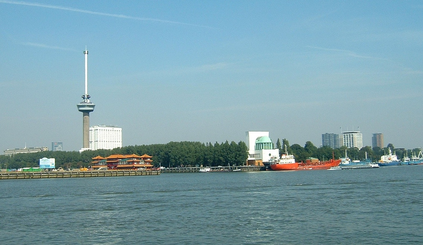 Euromast and entrance to the Maastunnel, Rotterdam